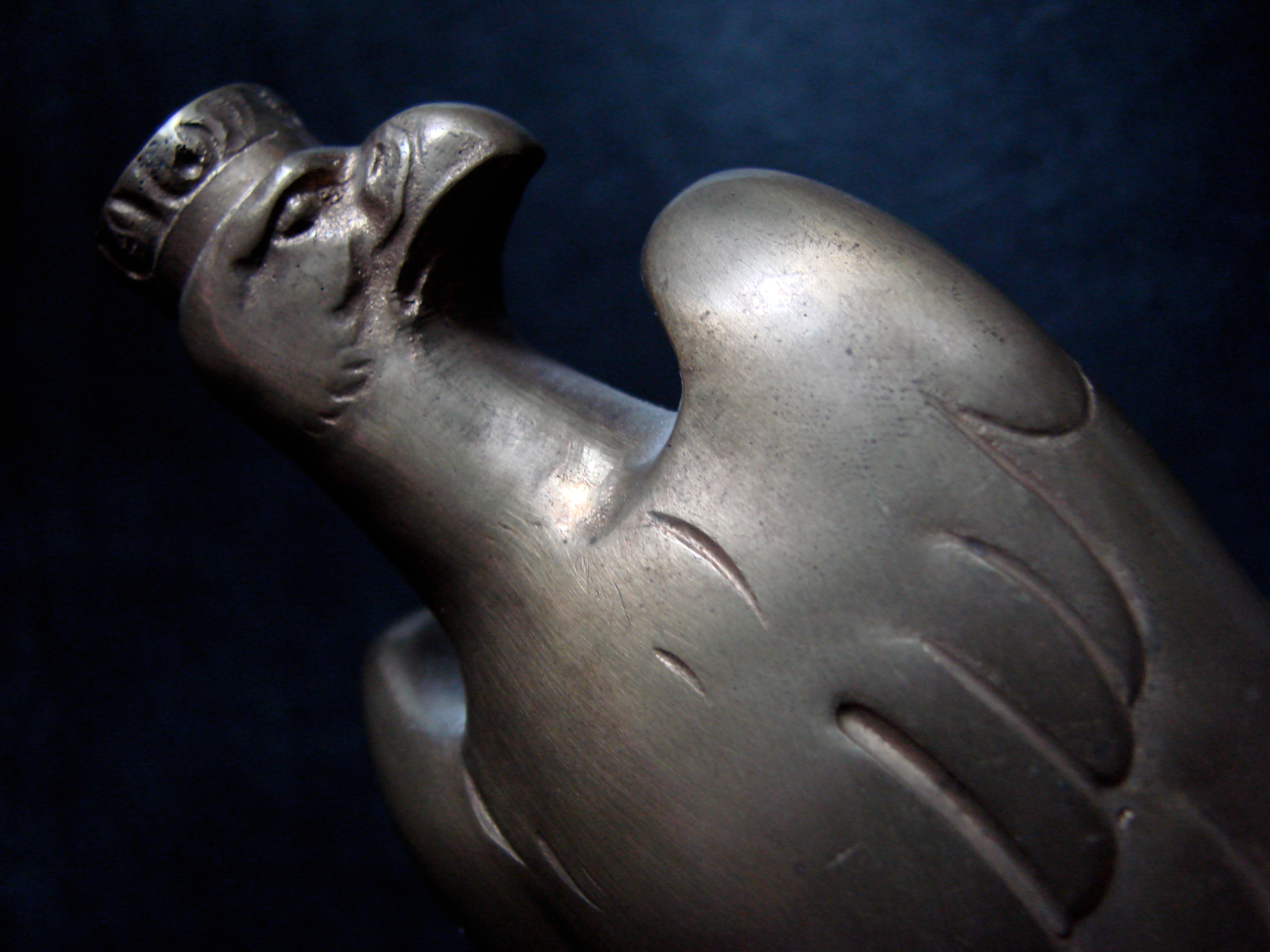 + 00000000001_Image_Fahnenspitze Adler mit Kaiserkrone - um 1900